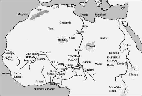 карта путешествий Х. Клаппертона